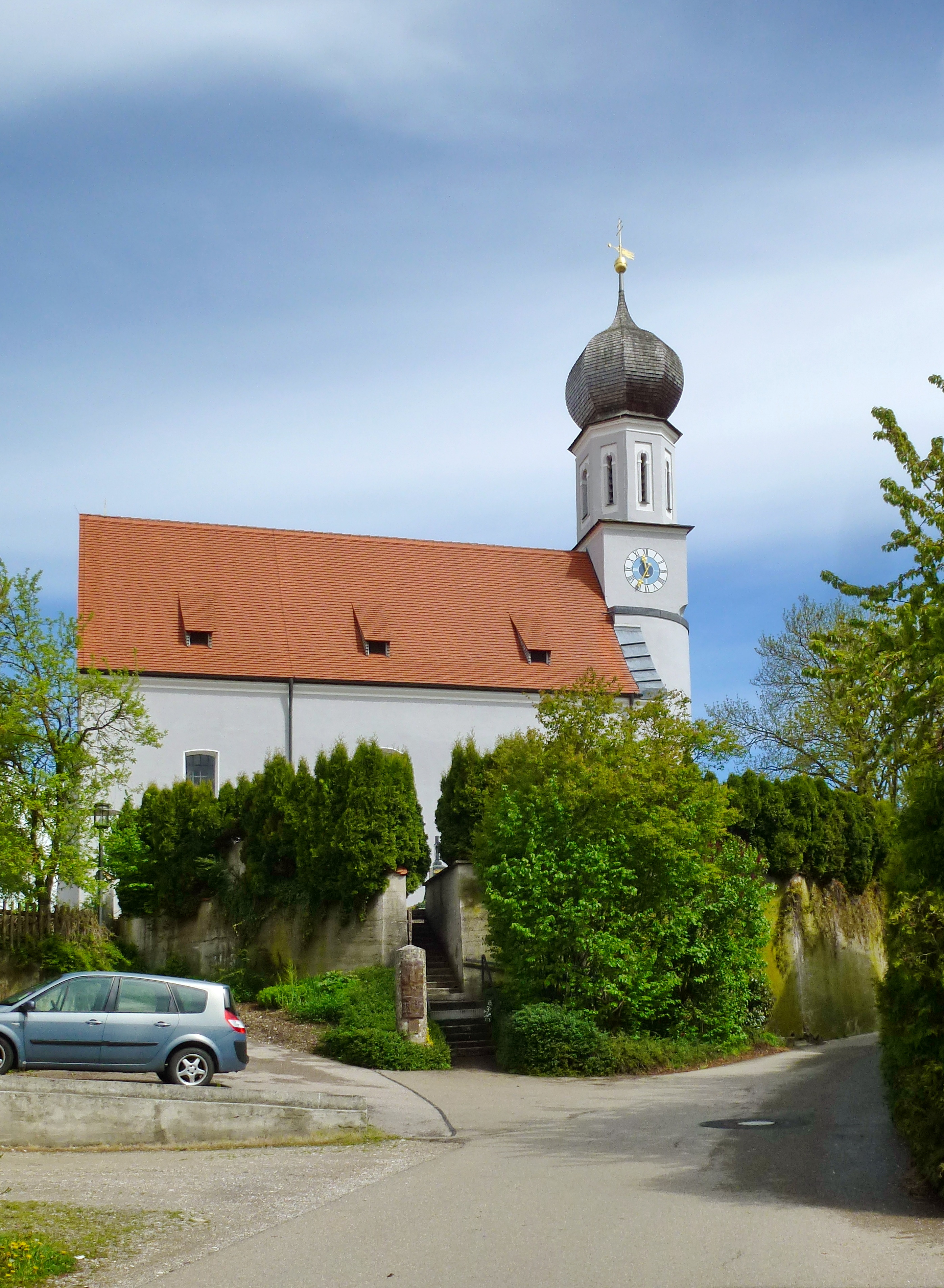 Oberroth (Gde Schwabhausen), Pfarrer-Schroll-Str. 7, Katholische Pfarrkirche St Peter und Paul, Ansicht von S